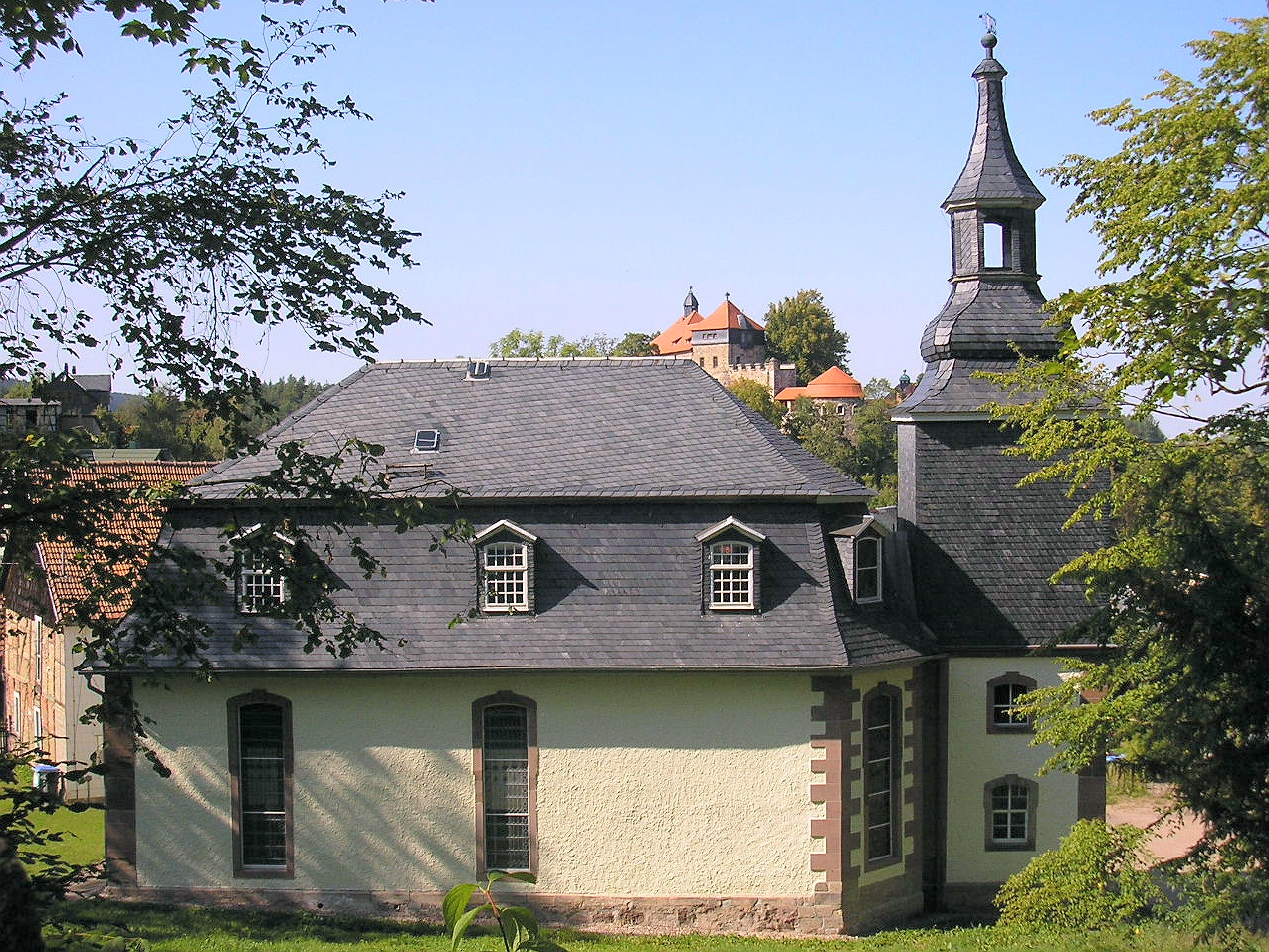 Die Kirche von Elgersburg im Ilm-Kreis (Thüringen, Deutschland)